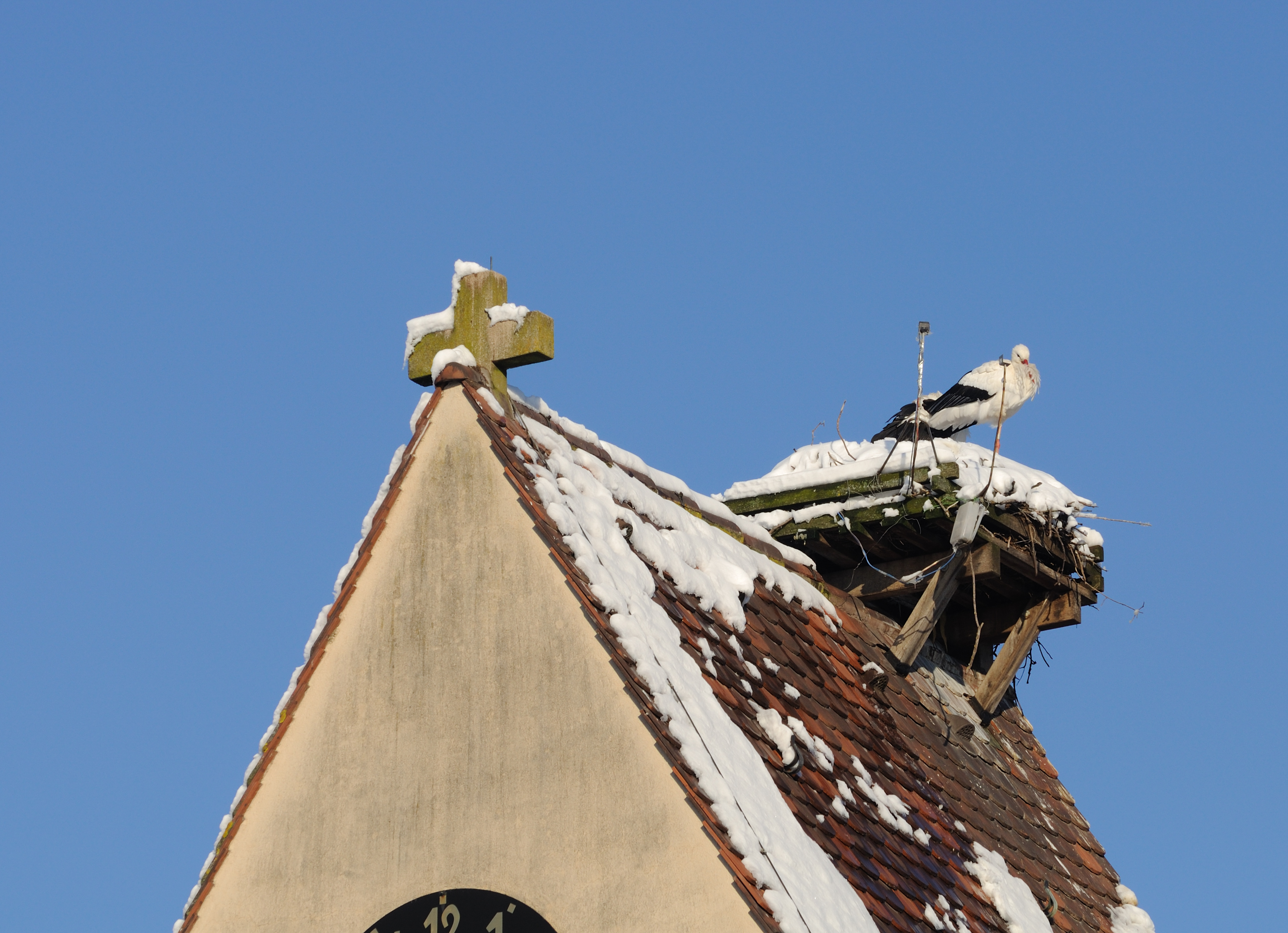 Weil am Rhein-Märkt: Evangelische Kirche (Kirchturmspitze mit Storchennest)